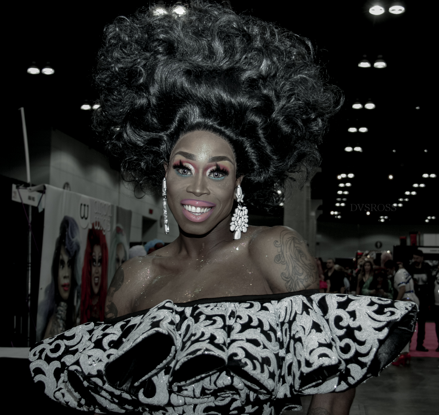 Rupaul's DragCon 2019